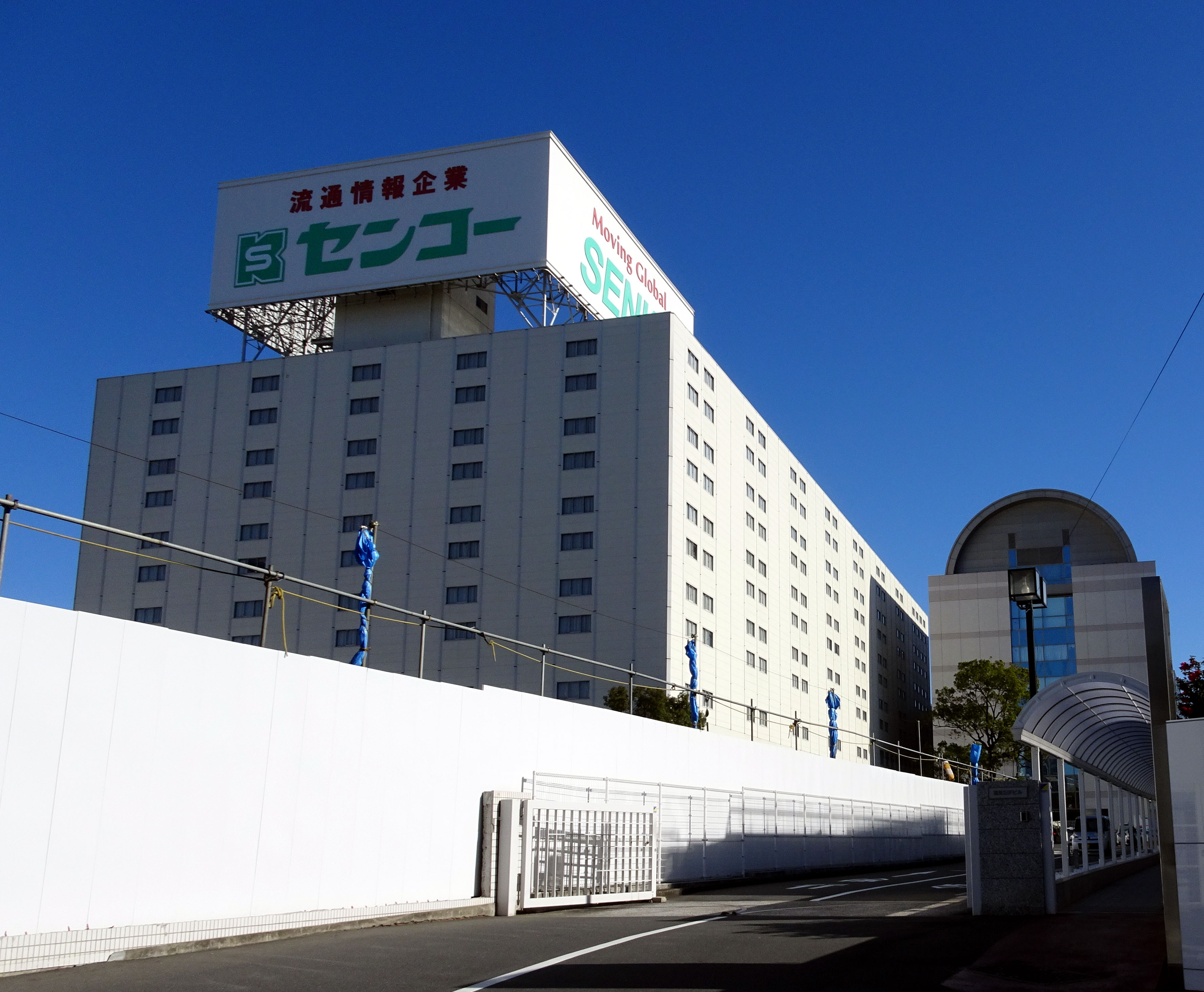 センコーグループホールディングス株式会社の本社外観。